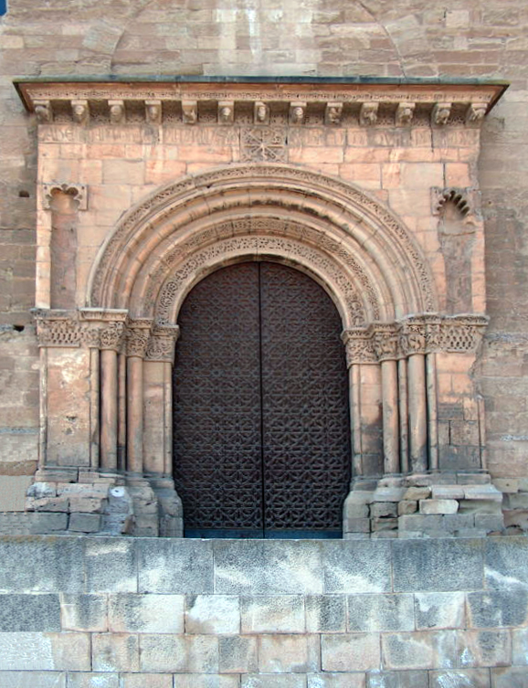 Sé Velha de Lérida. Sé Velha de Lérida em Espanha.